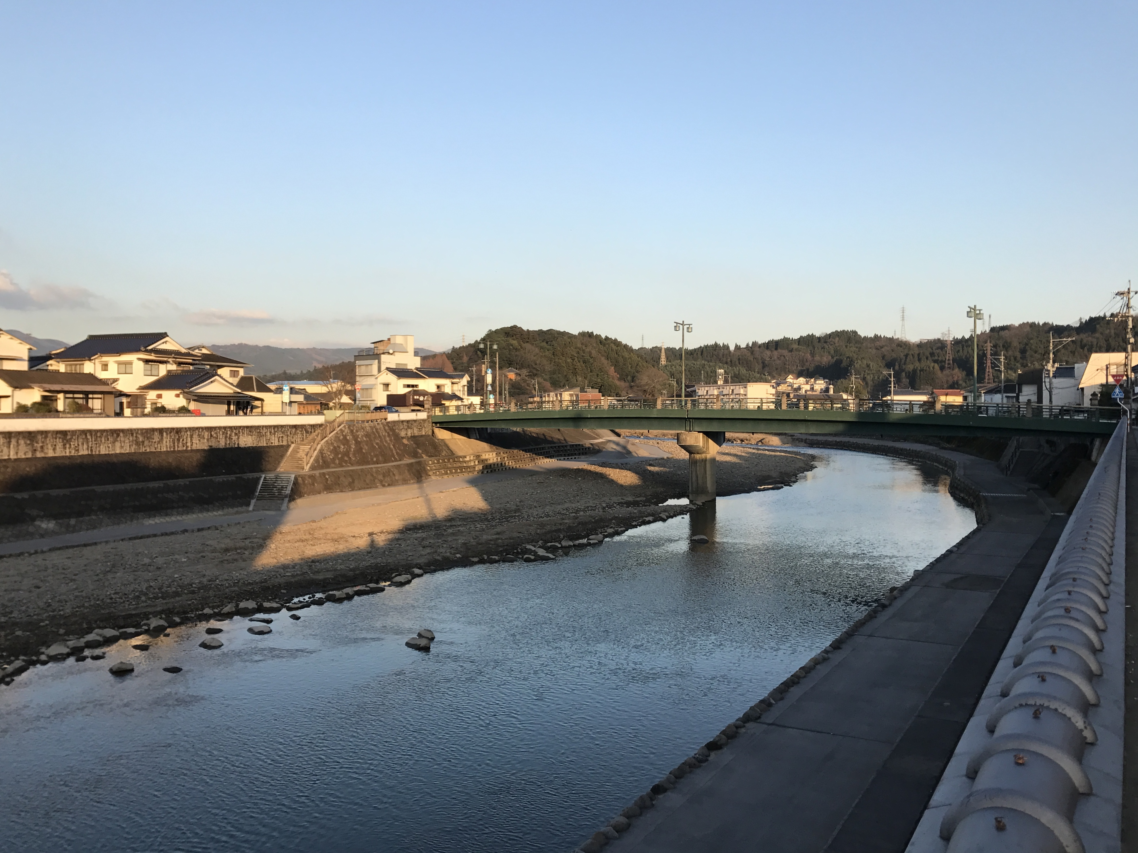 花月川に架かる一新橋